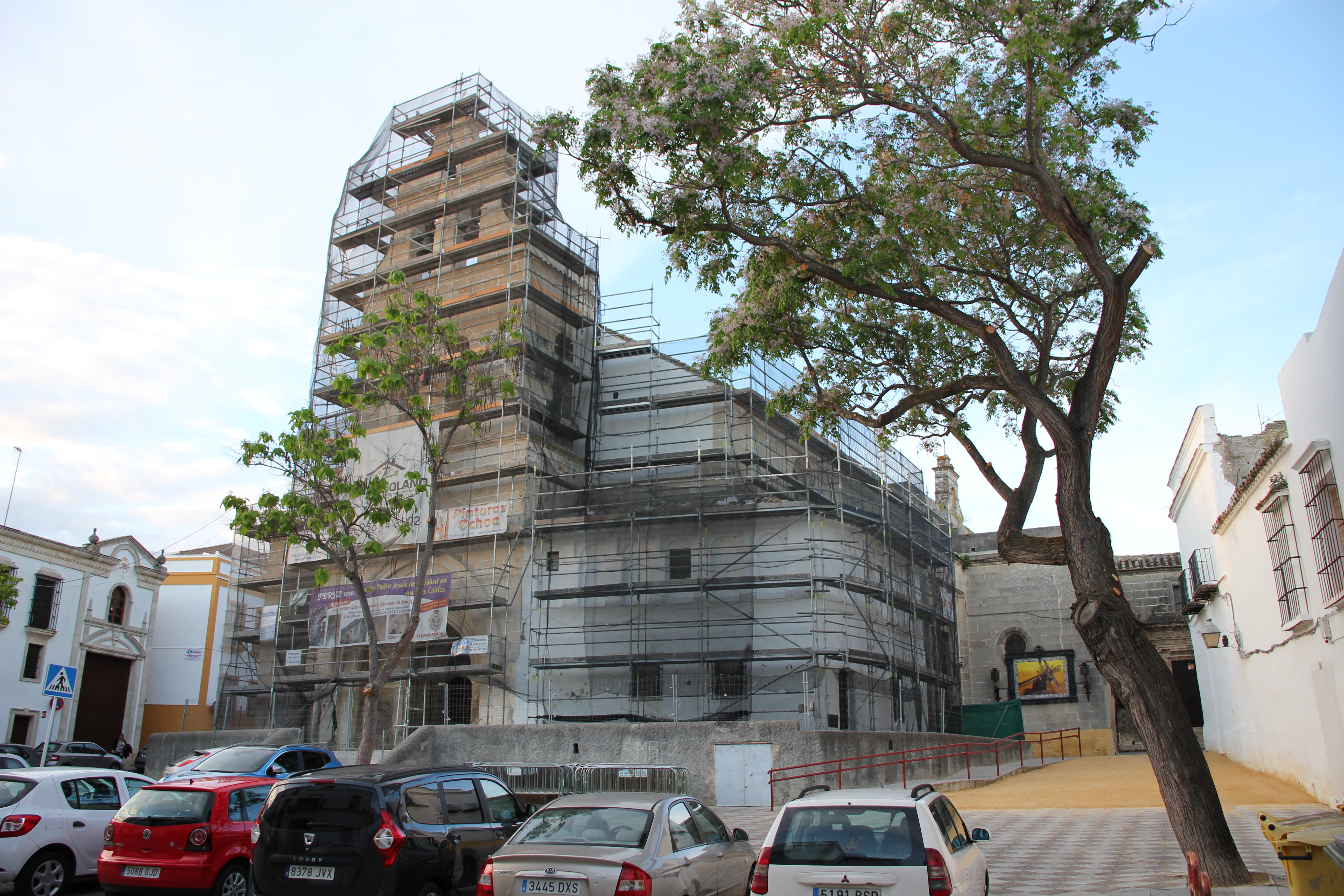 Iglesia de San Lucas en obras (Jerez de la Frontera)